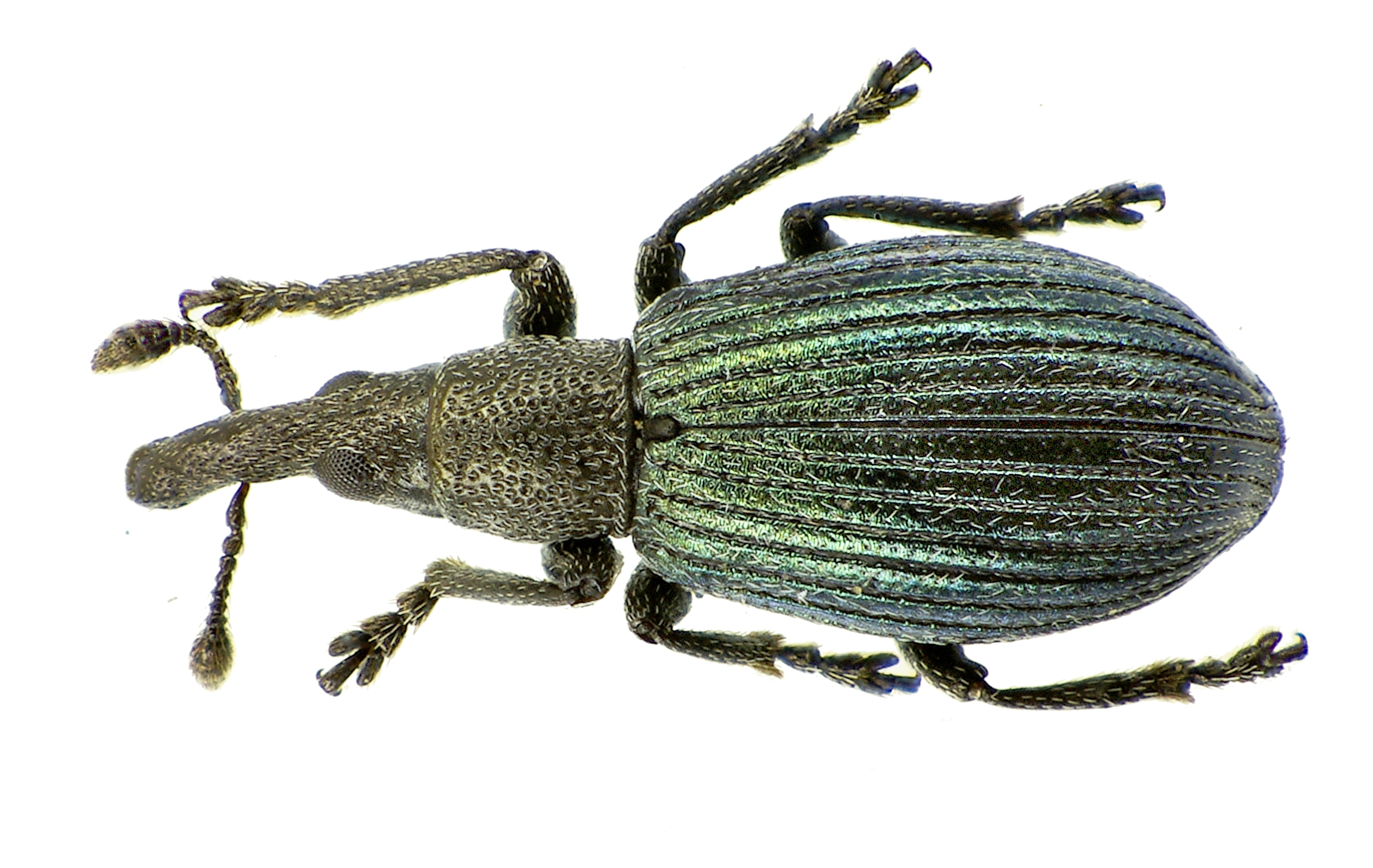 Perapion violaceum aus Frankreich bei Muhlouse am15. April 2013, Oberseite